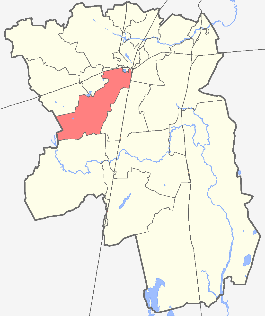 Большеколпанское сельское поселение на карте Гатчинского района